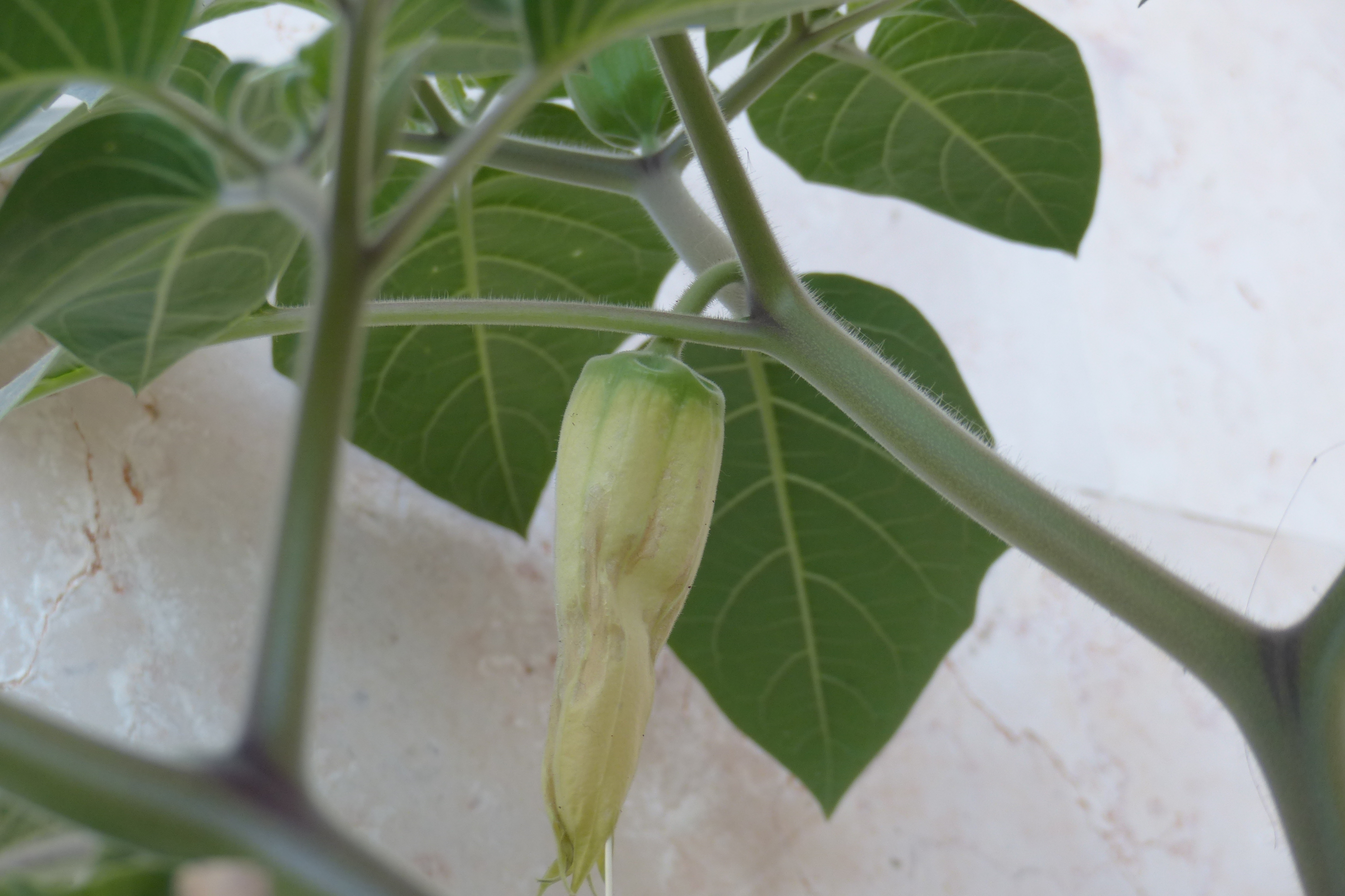 פרח הדטורה לאחר הפרייתו הופך לתרמיל בשנית שבתוכו גדל הפרי הקוצני